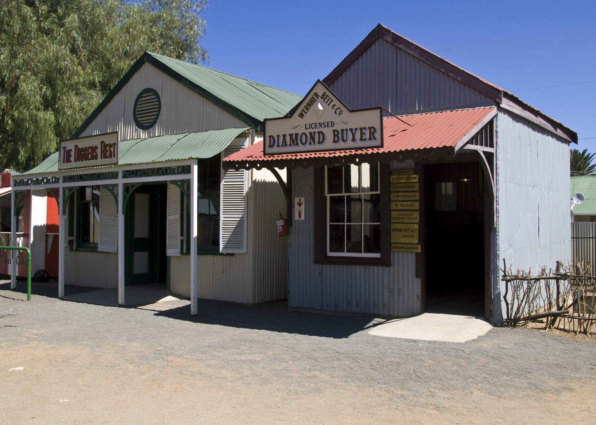 Venkovní expozice hornického muzea v Kimberley v Jihoafrické republice